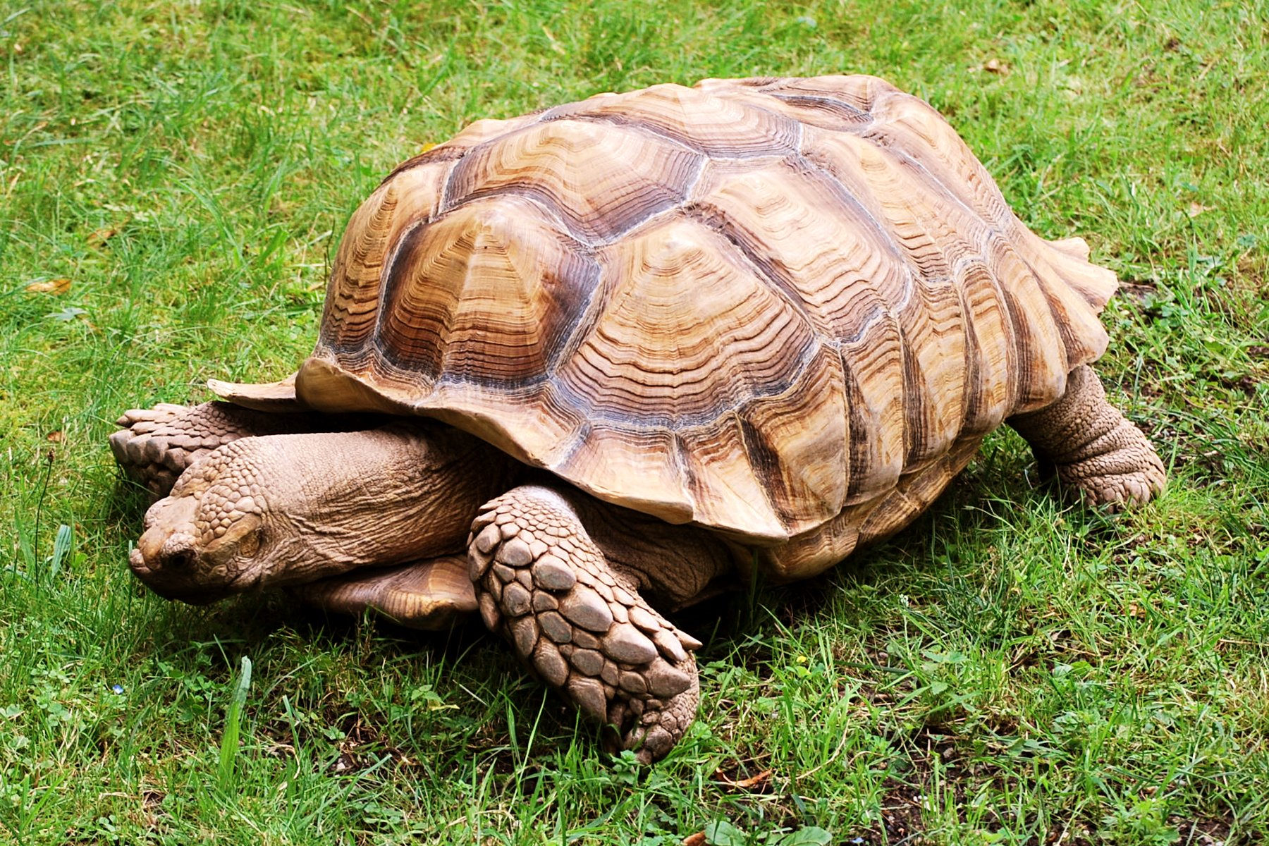 Spornschildkröte im Zoo Augsburg.